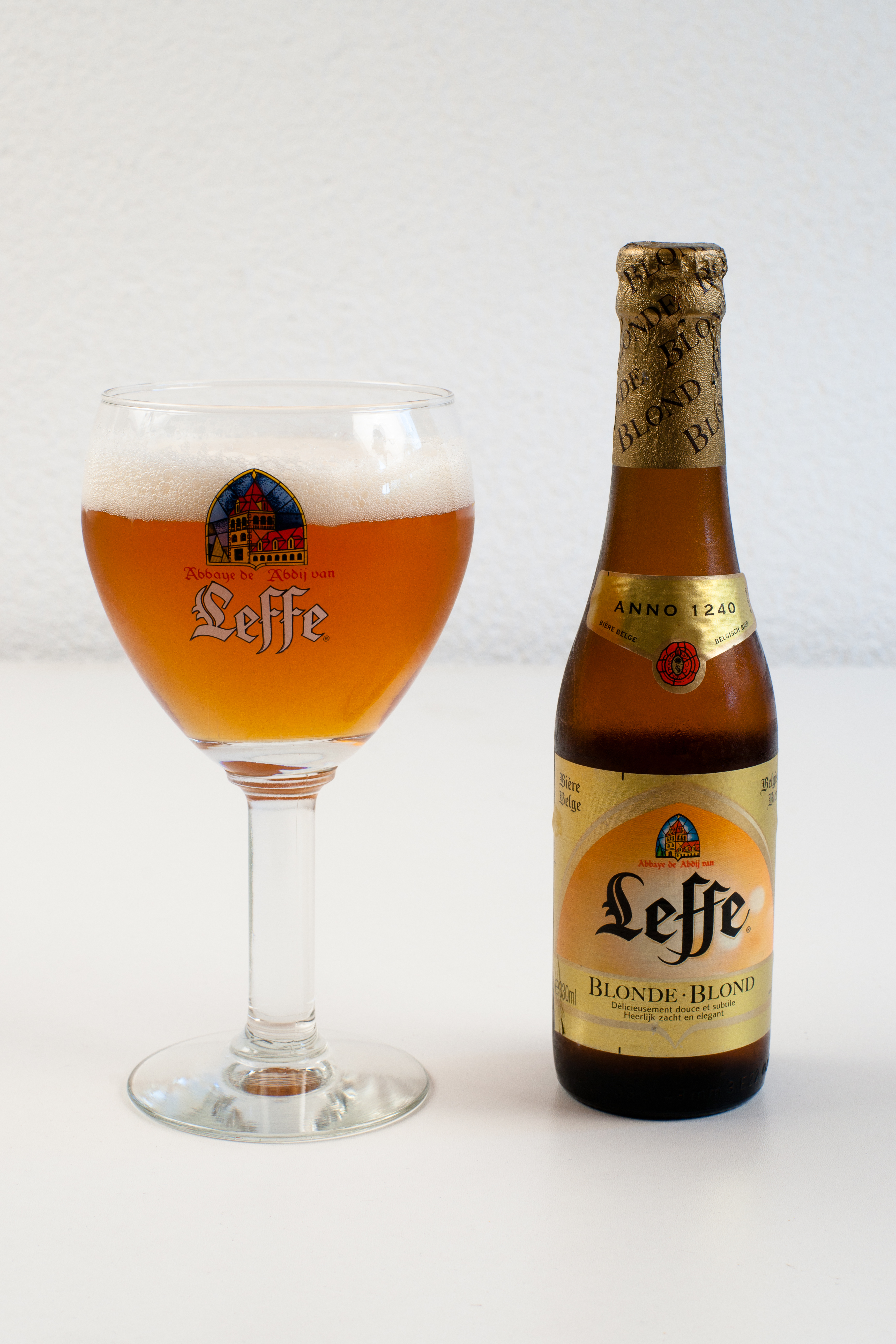 Leffe blonde verre et bouteille